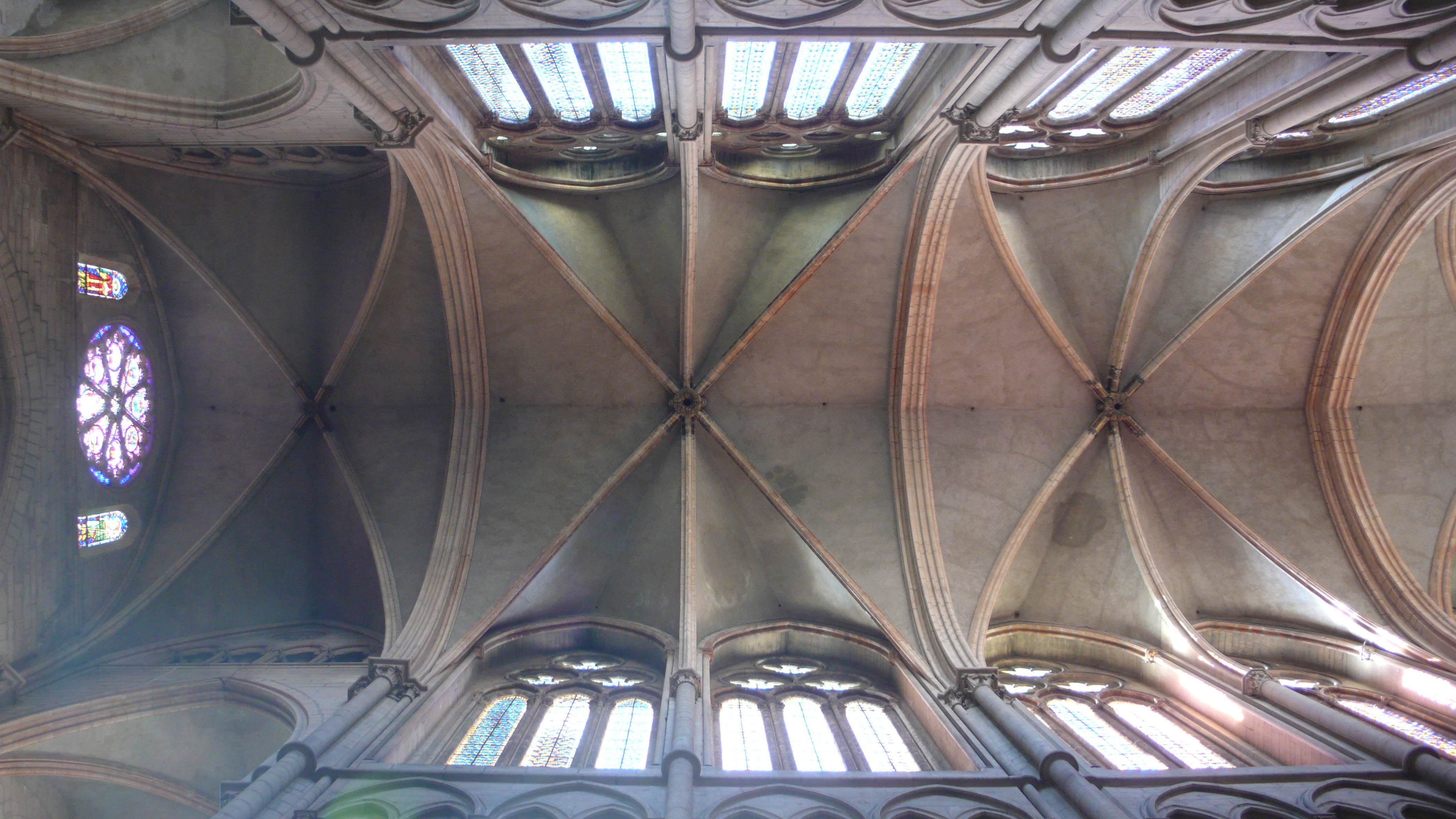 Primatiale de Saint-Jean, Vieux Lyon: Voûtes. .